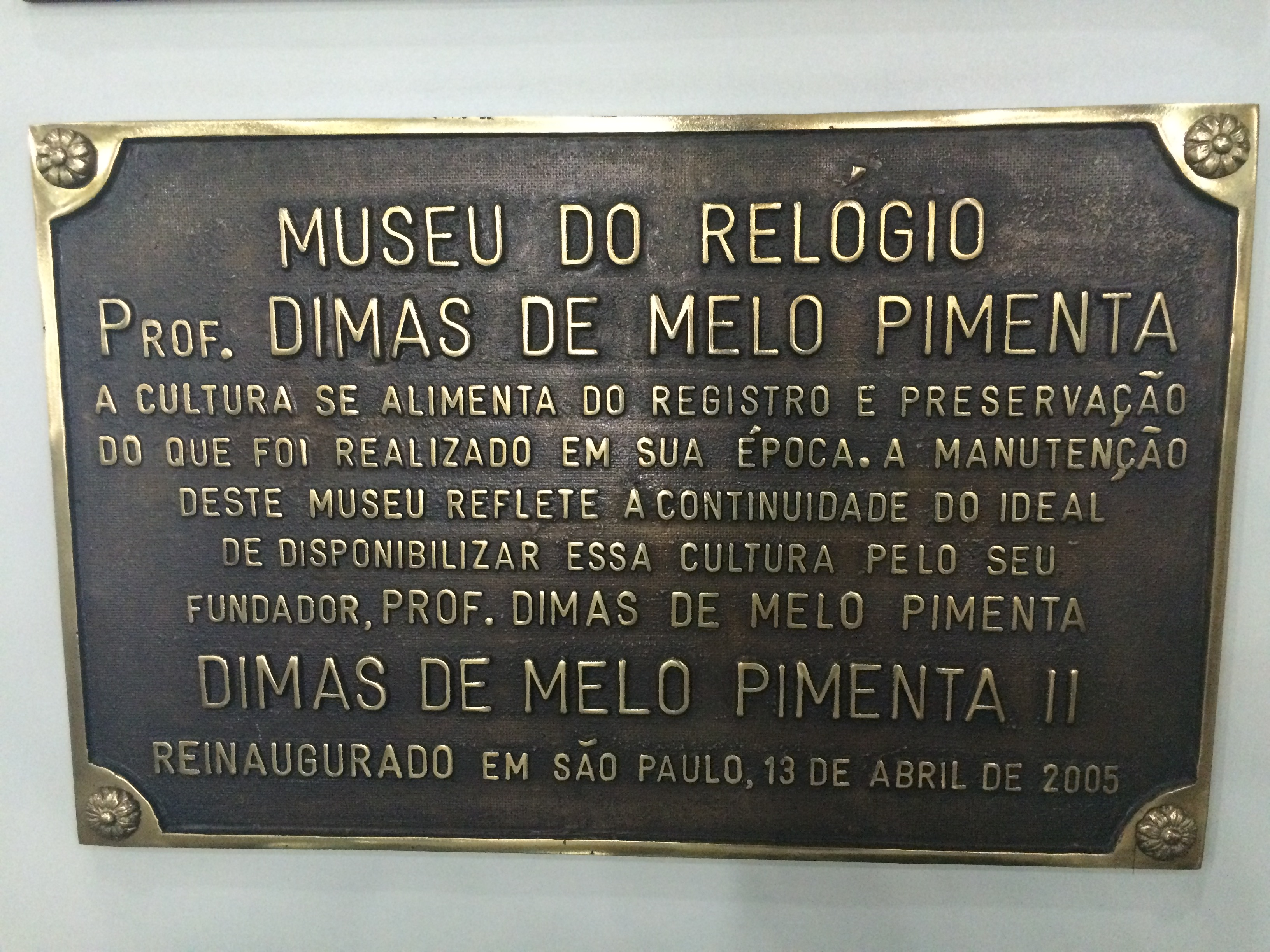 Placa informativa do Museu do Relógio prof. Dimas de Melo Pimenta, em São Paulo (SP), Brasil.